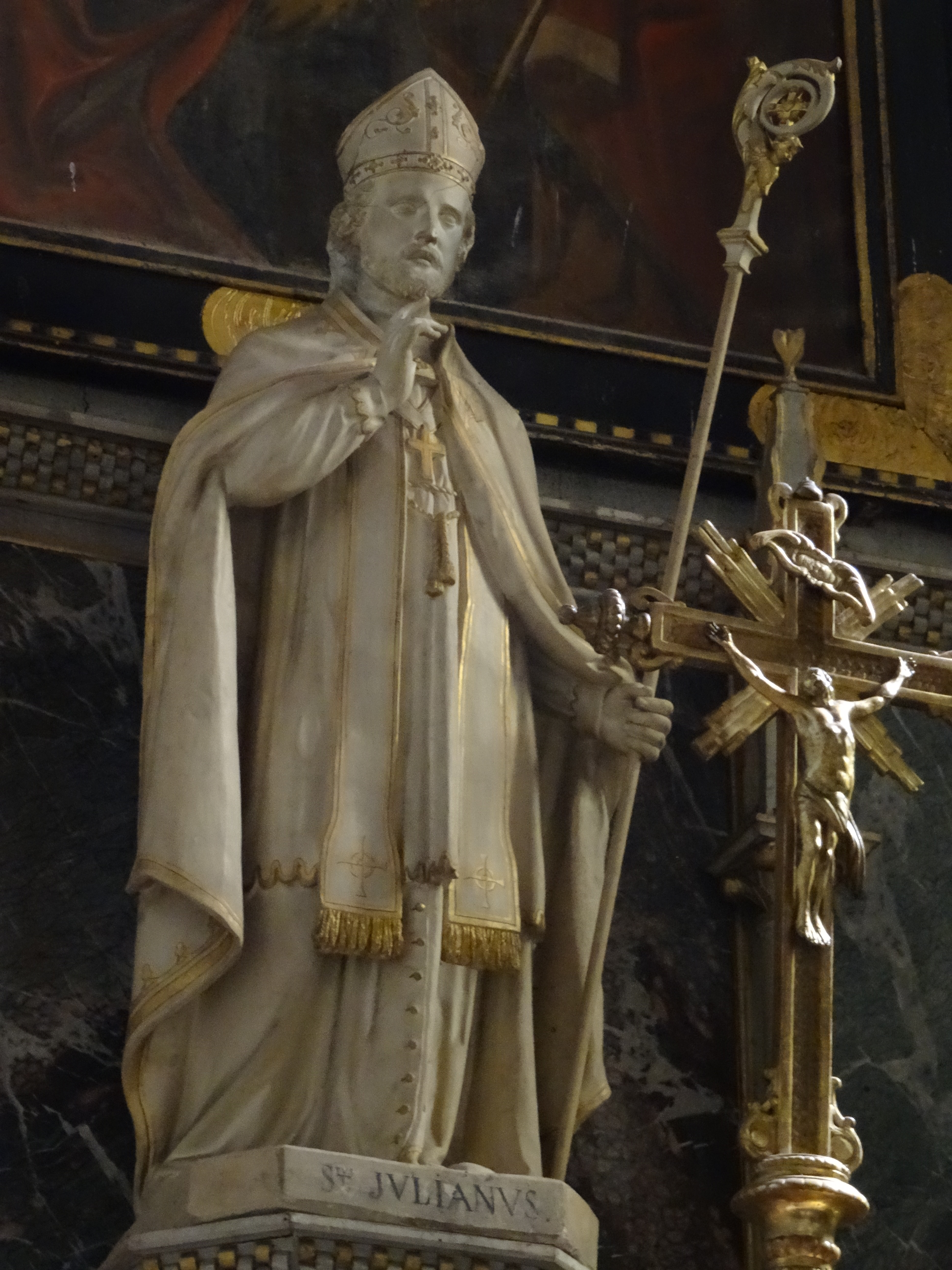 Représentation de Saint-Julien de Lescar